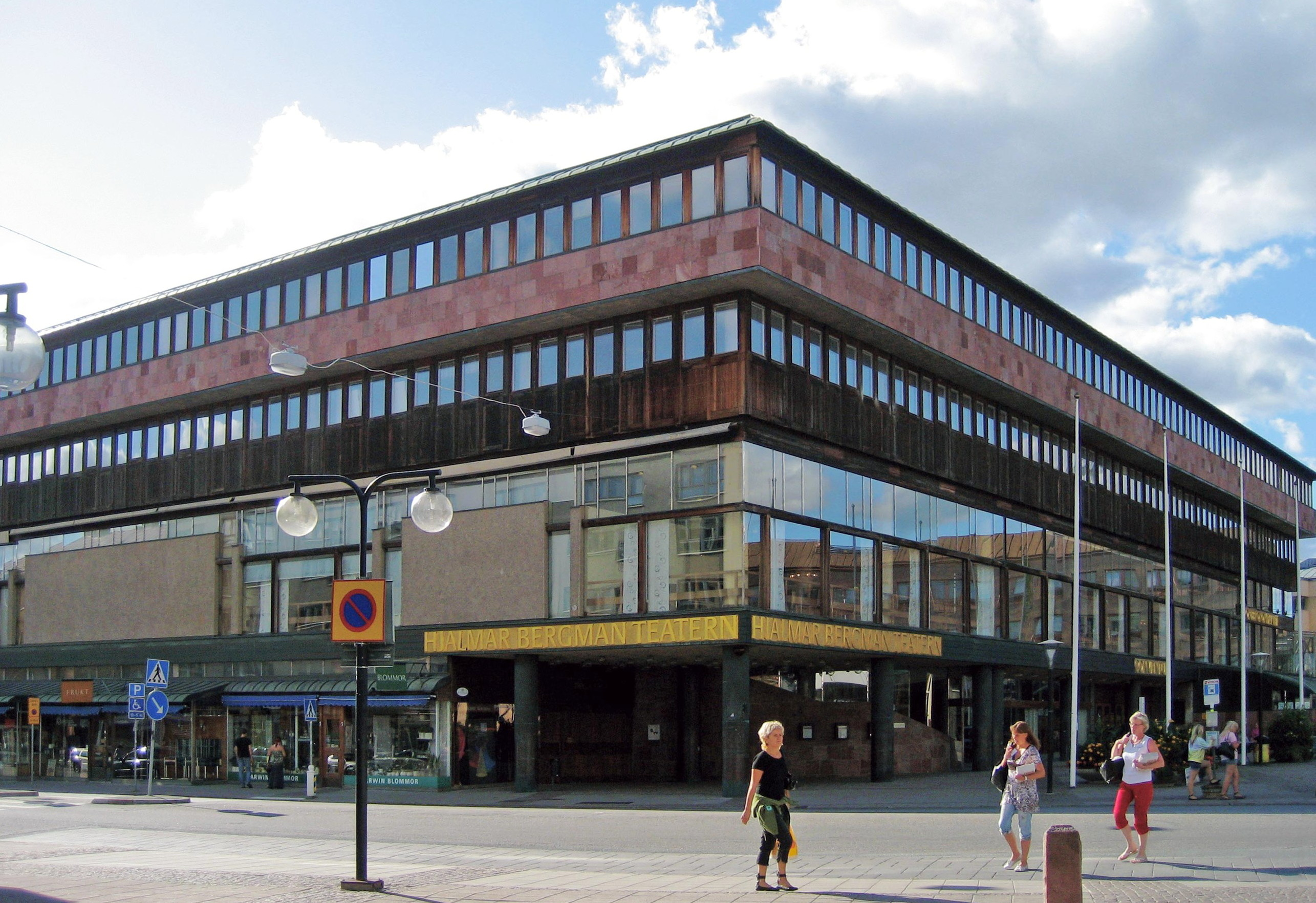 Medborgarhuset, Örebro, Sweden